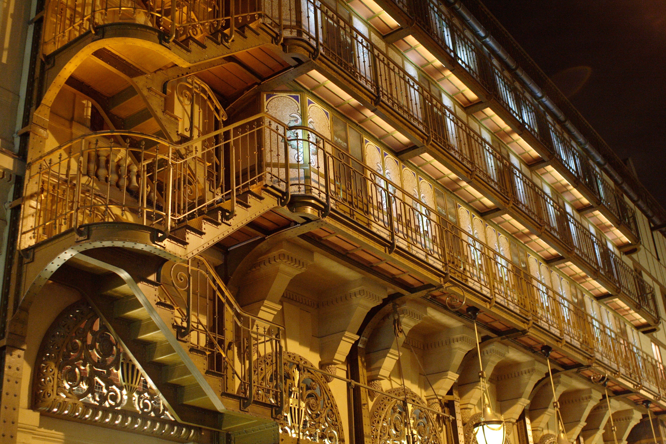 Théâtre du Palais-Royal, Paris, escalier en façade.